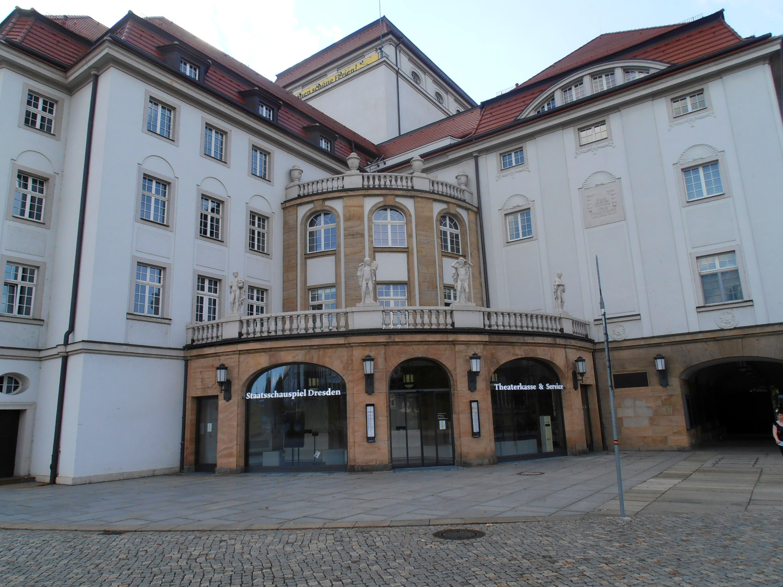 Kartenverkauf und Anrechtsbüro, die sich seit 2012 in der östlichen Gebäudeecke, der ehemaligen königlichen Vorfahrt, befinden.